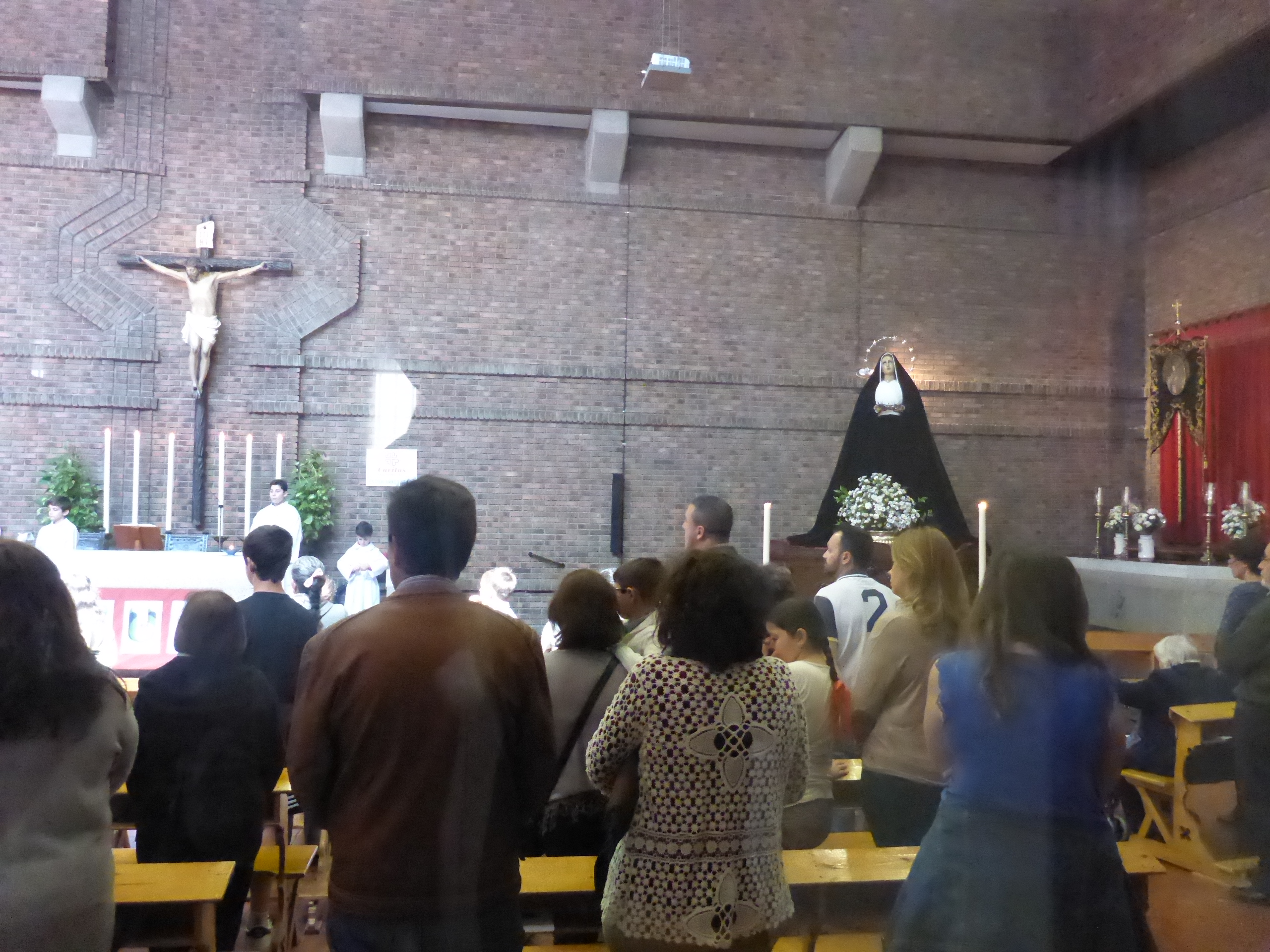 Parroquia Madre de Dios Jerez de la Frontera (España)